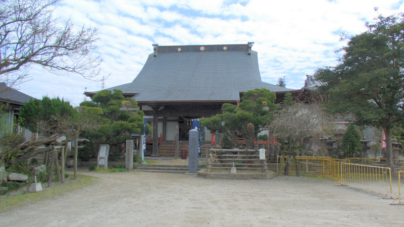 願成寺_(人吉市) 撮影者/著者/著作権保有者 : MK Products (本人がアップロード) 撮影日 : 2007/03/14 相良藩願成寺駅用にアップロードした画像です。良い画像があれば別の画像に変えてください。